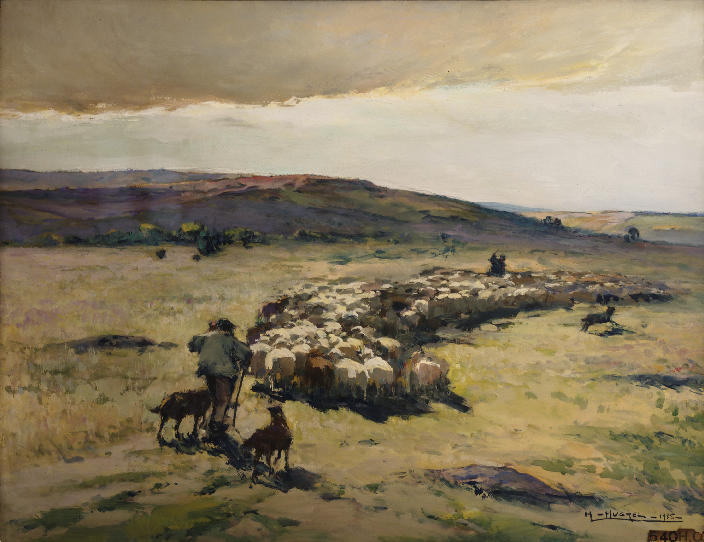 Le grand troupeau, Honoré Hugrel (1880-1944). S.D.b.d "H.Hugrel 1935. Détrempe sur contreplaqué 73 x 92. Don de l'auteur en 1938. Musée des Ursulines de Mâcon. Inv A.819